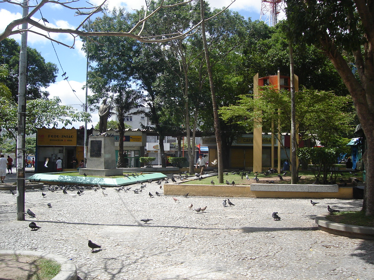 Praça da Bandeira, Campina Grande - PB. Ano: 2006.